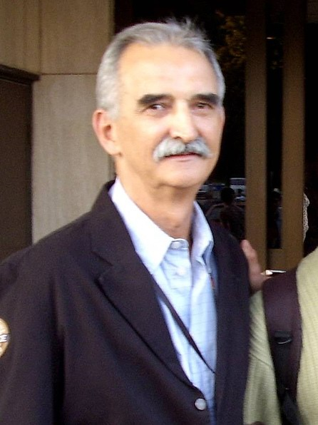 Marek Koterski (ur. 3 czerwca 1942 roku w Krakowie) - polski reżyser filmowy i teatralny, scenarzysta, aktor i dramatopisarz